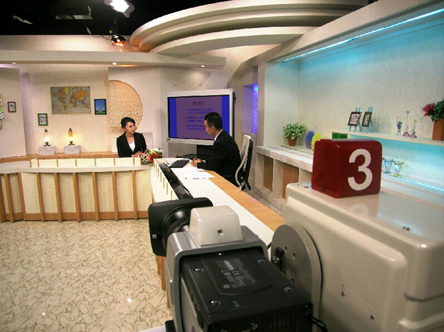 大和総研レポート、大和スペシャリストレポートなどの経済番組のキャスターを担当